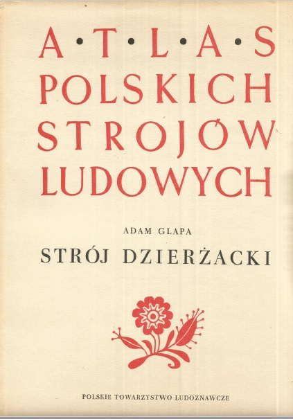 Okładka książki "Strój dzierżacki"